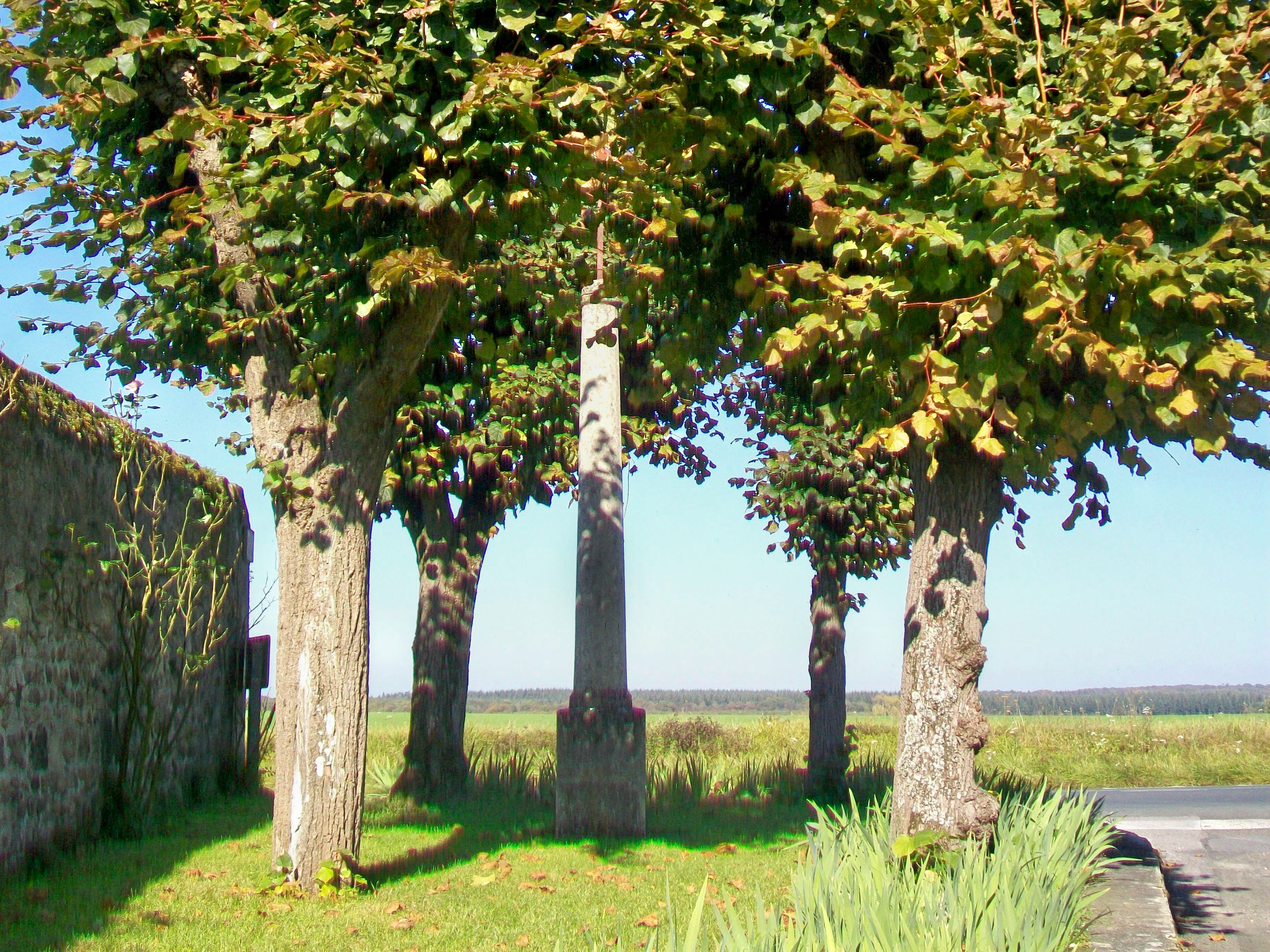 Le calvaire de l'abbé Prévost, rue du Calvaire / RD 924.